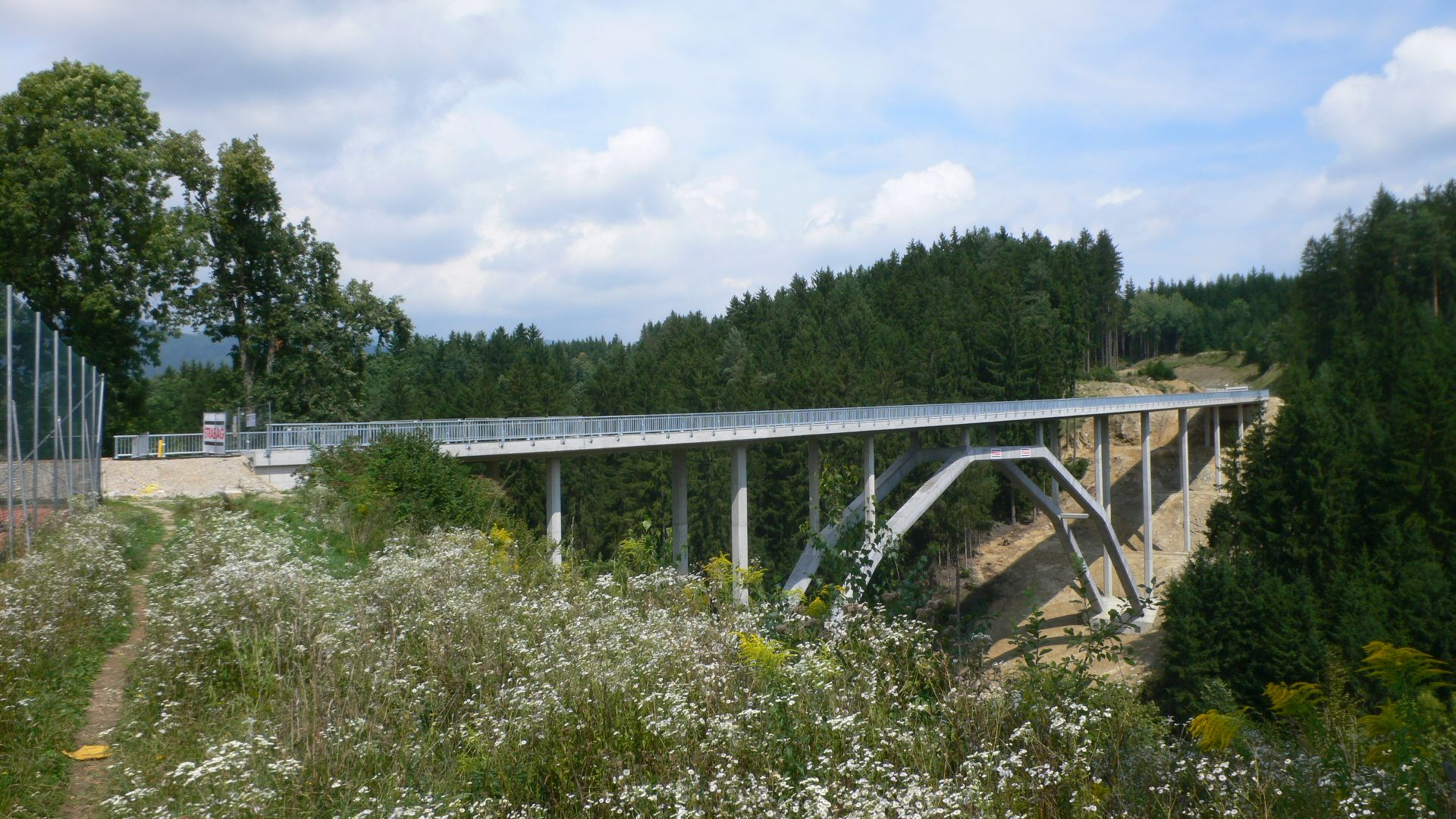 Weltweit (2010) größter tragender Bogen aus UHPC